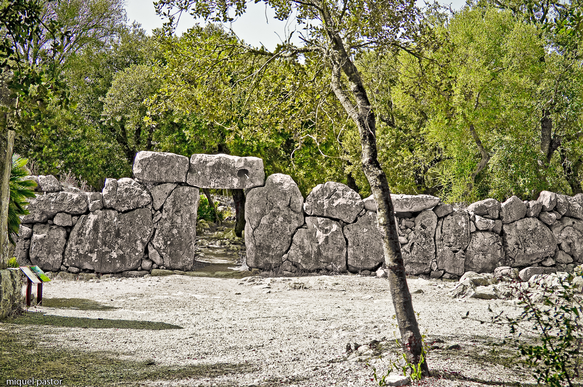 Vista del tram sudest i la porta monumental del poblat talaiòtic de Ses Païsses, Artà, Mallorca.